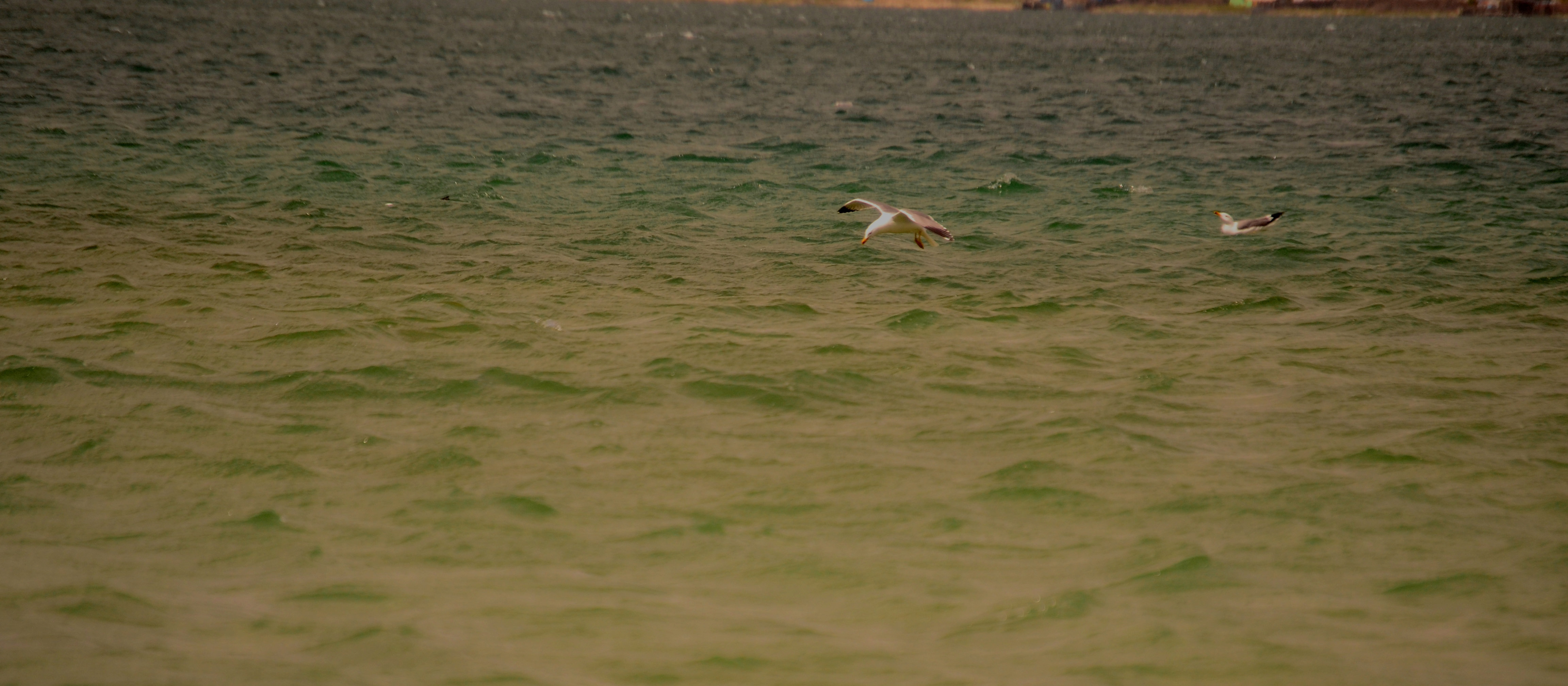 Հայաստան Սևանա լիճ